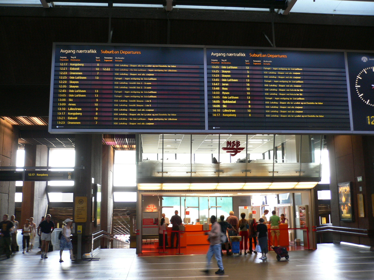 Oslo Central Station